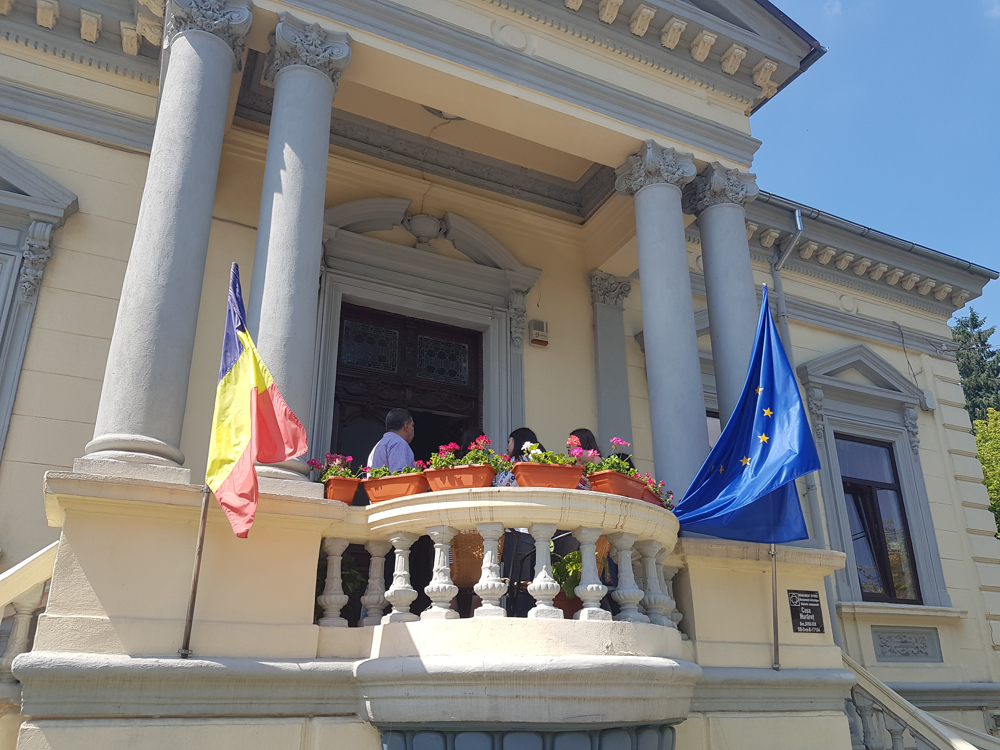 Casa Murăreț